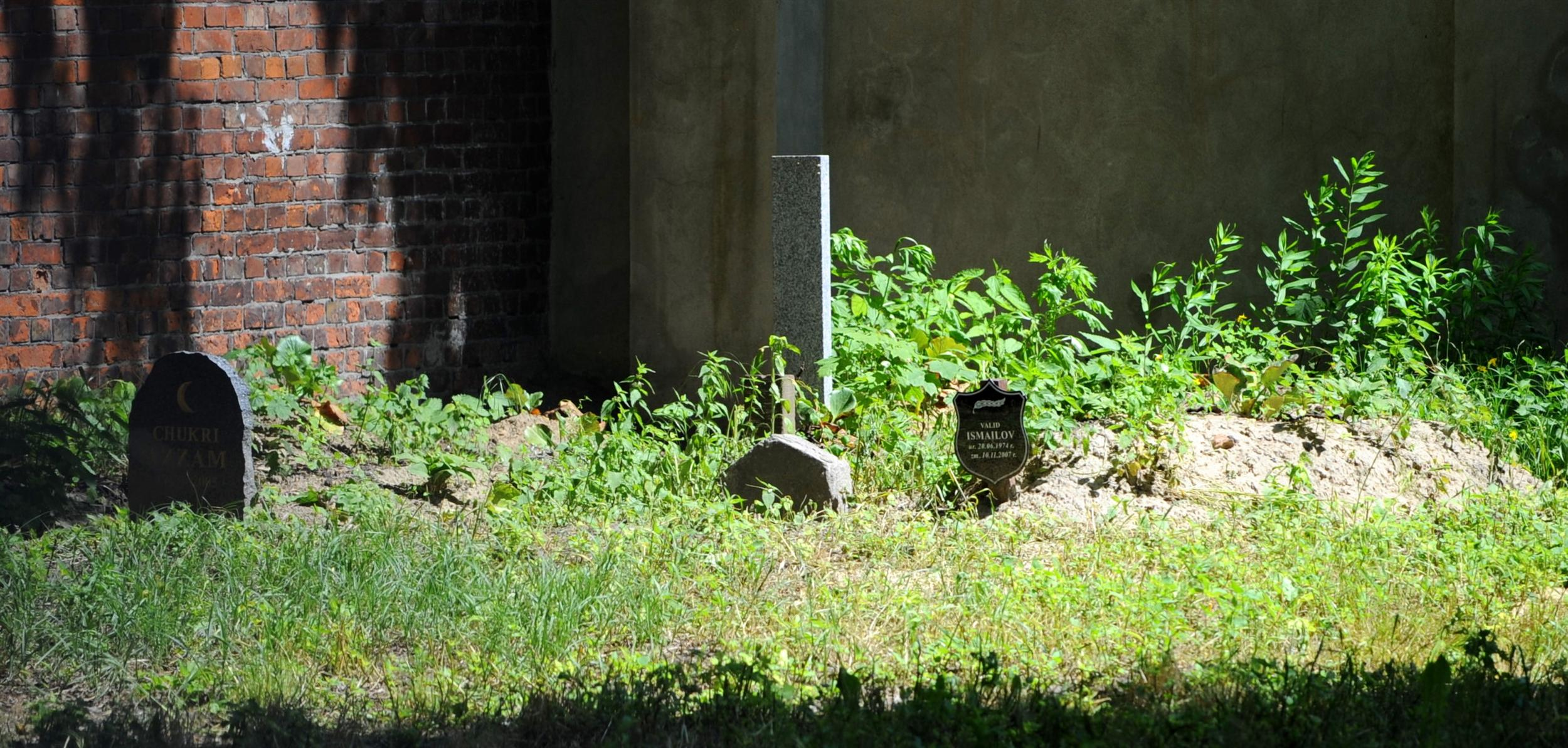 Nagrobki na Muzułmańskim Cmentarzu Kaukaskim w Warszawie